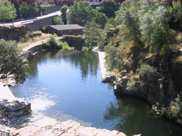 Zona de baño en las mestas